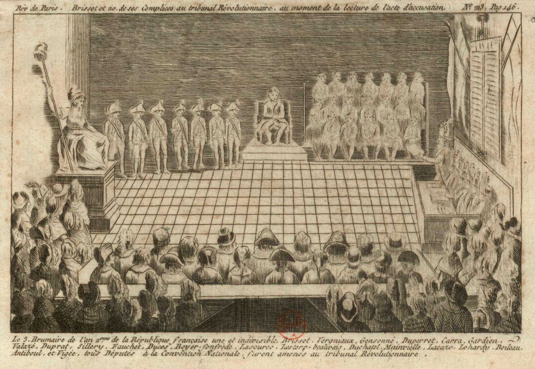 Brissot et 20 de ses complices au tribunal révolutionnaire au moment de la lecture de l'acte d'accusation, estampe.